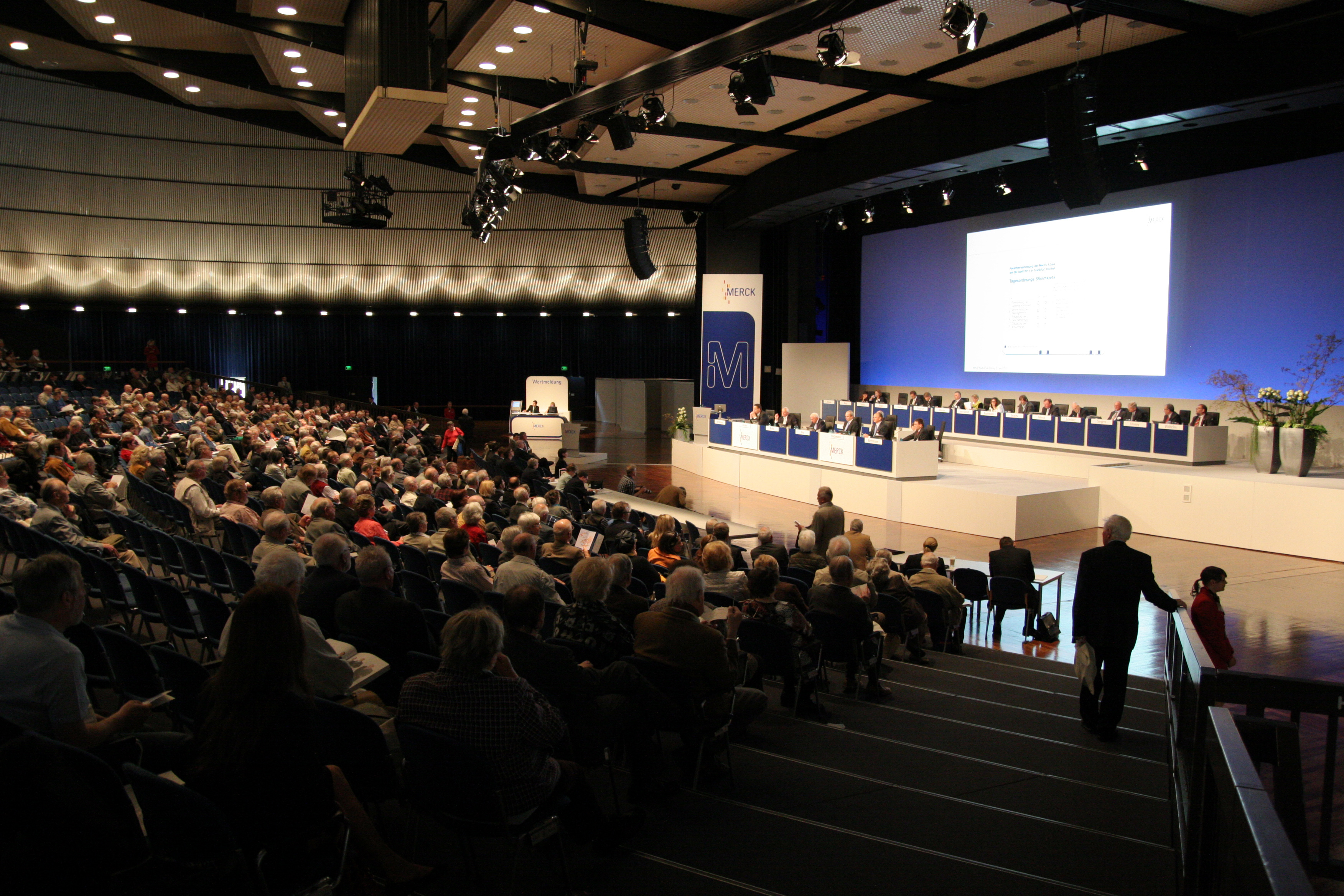 Die Hauptversammlung der Merck KGaA in der Frankfurter Jahrhunderthalle am 8. April 2011.